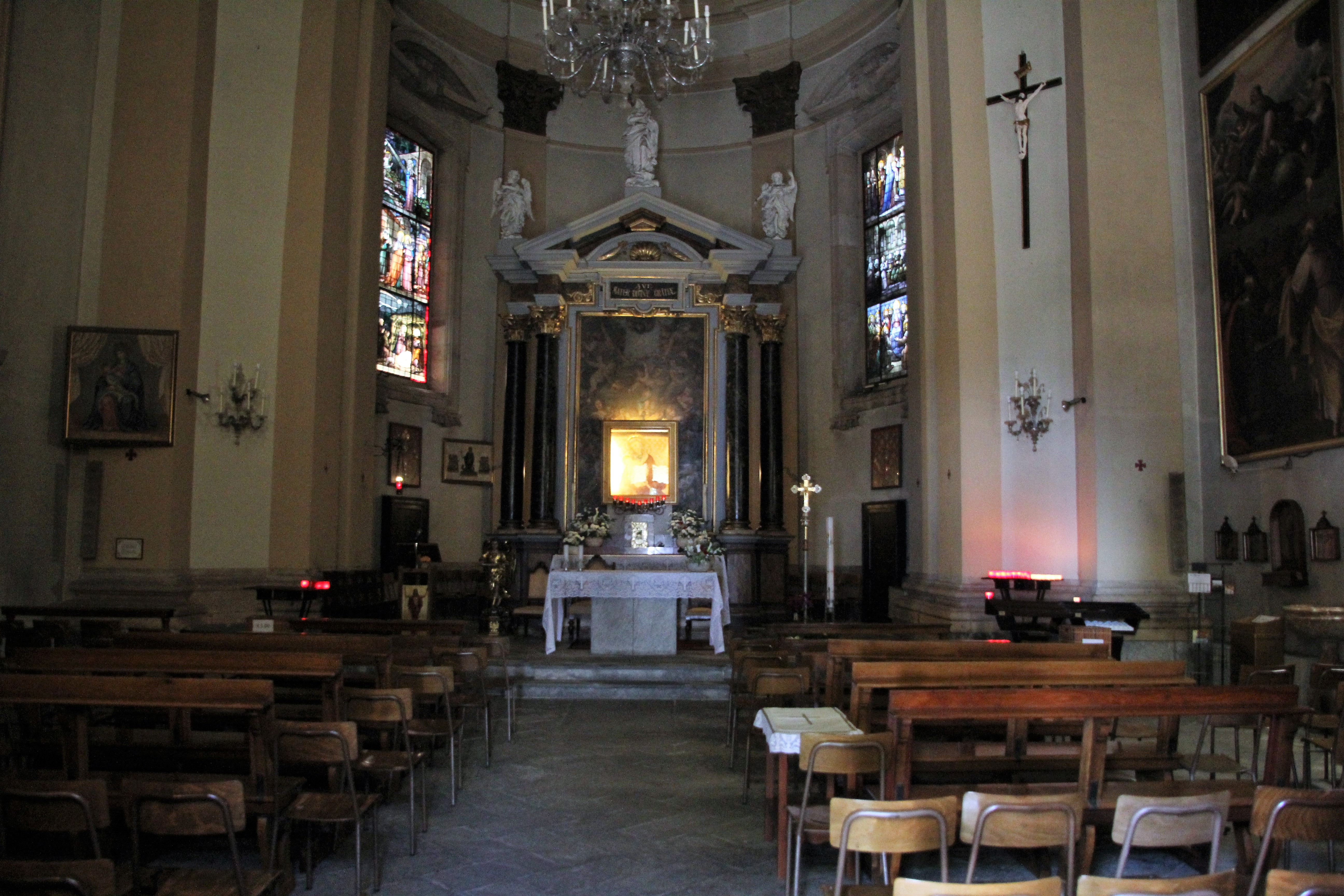 santuario della Madonna della Riva